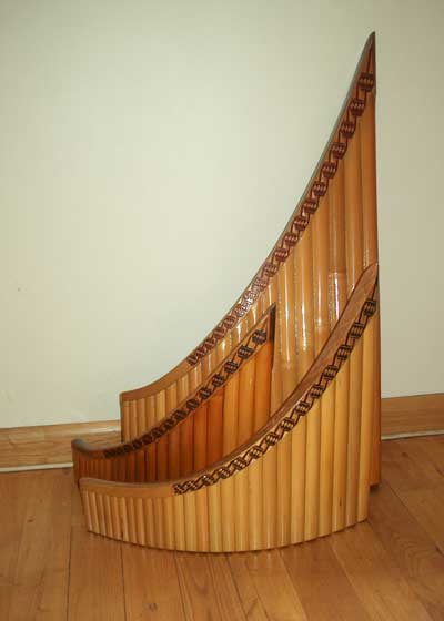 trois flûtes de Pan roumaines (naïs)